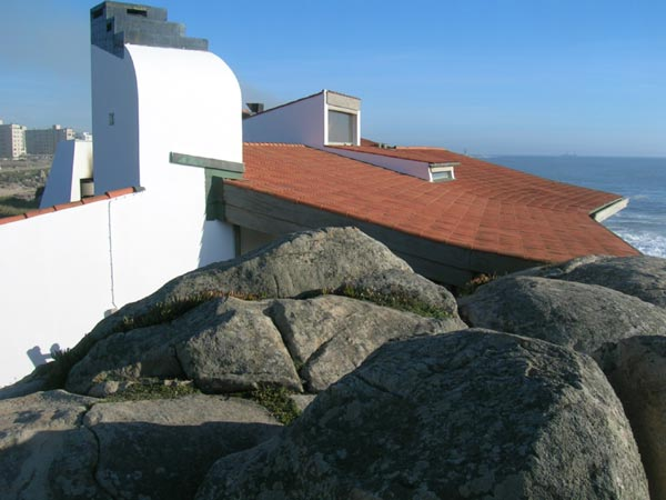 Architektur: Álvaro Siza Vieira: Boa Nova Tee Pavillon & Restaurant in Leça da Palmeira (Portugal) Fotografiert von Janekpfeifer am 18.September 2004